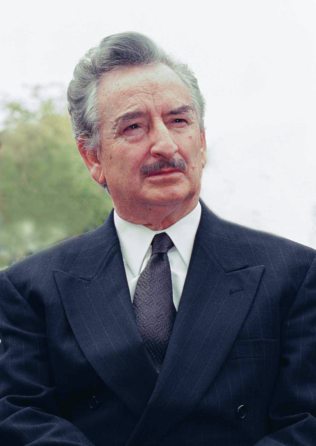 foto del Extinto Fernando Gutierrez Barrios Politico Veracruzano 1927-2000